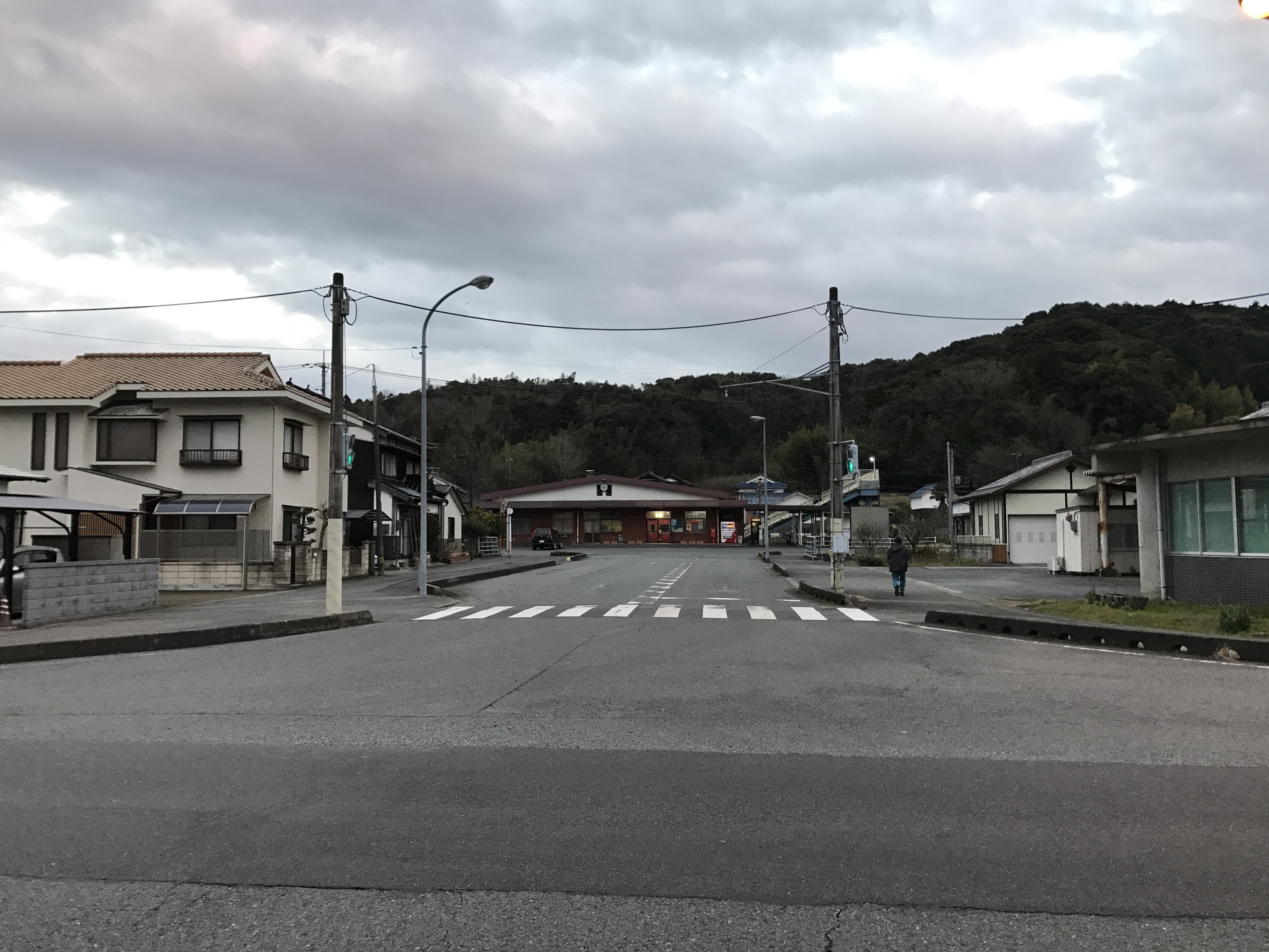 滝部駅の遠景